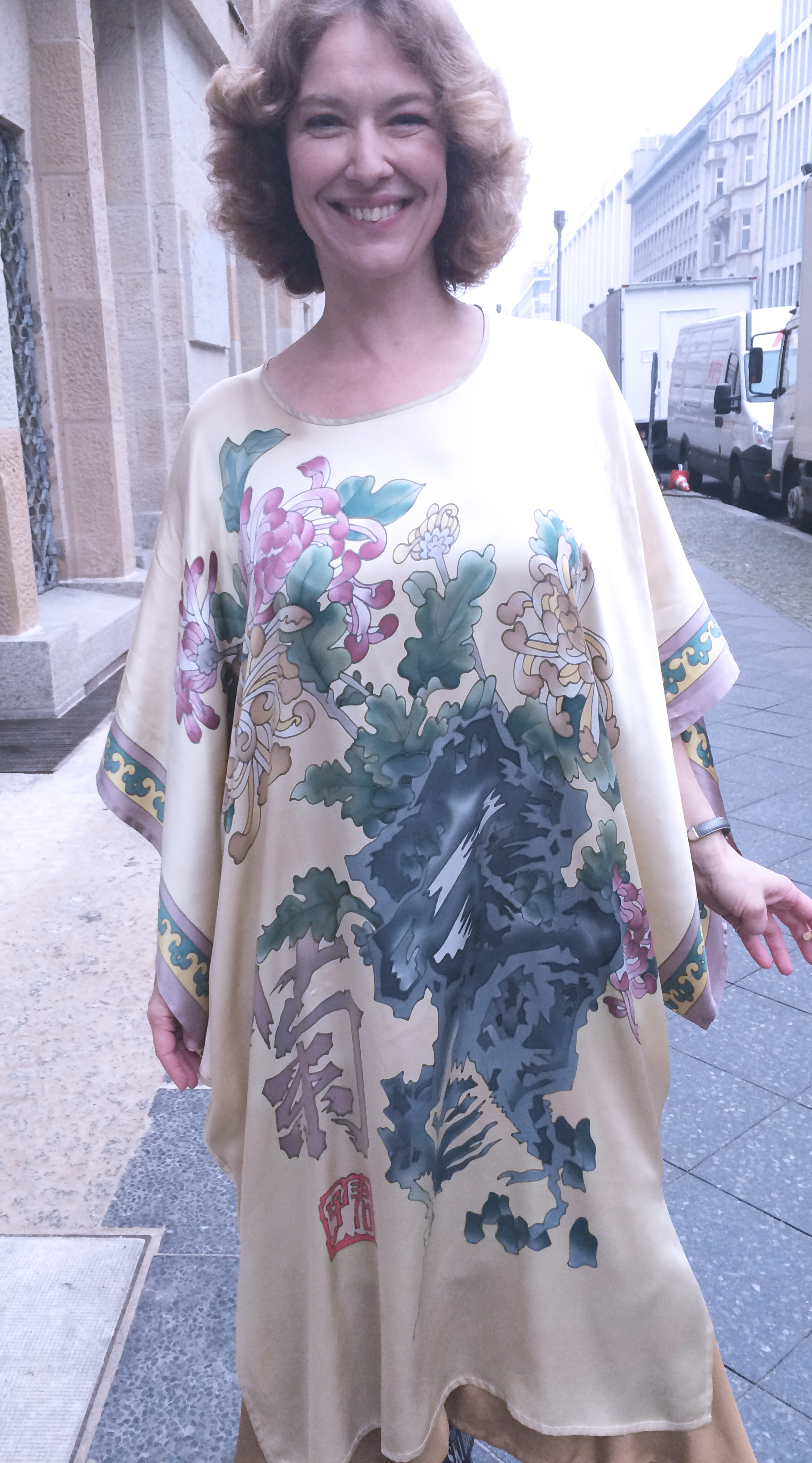 Charlotte Crome. Setfoto Deutschland83. Kostüm Cosima von Schwerin. Copyright atr